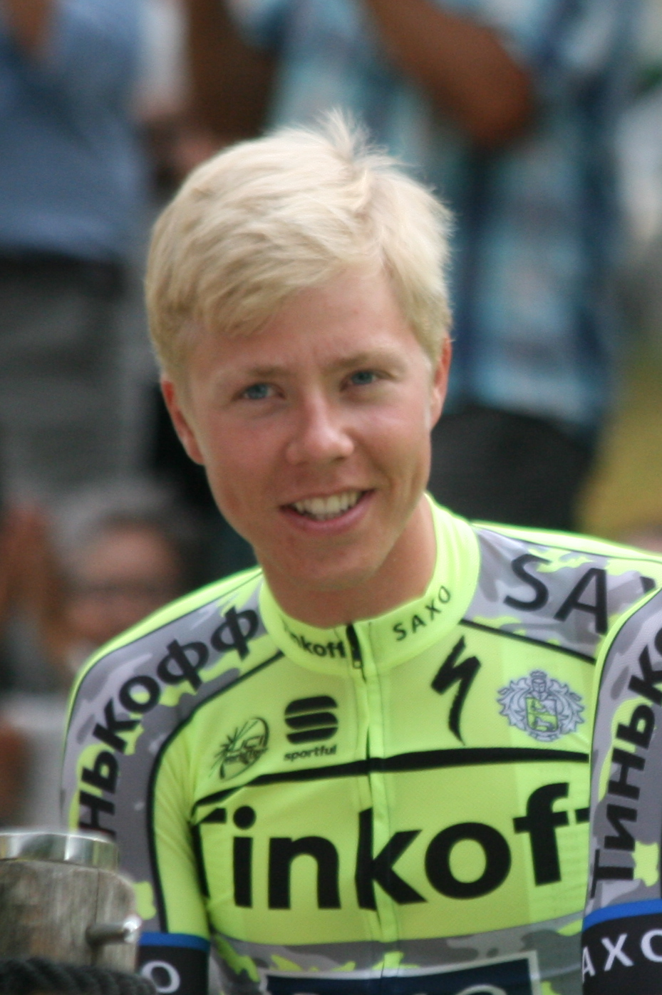 ploegenpresentatie Tour de France 2015 Utrecht